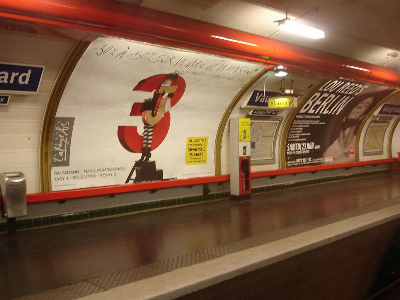 Métro de Paris (France) - ligne 3 - Station Vaugirard